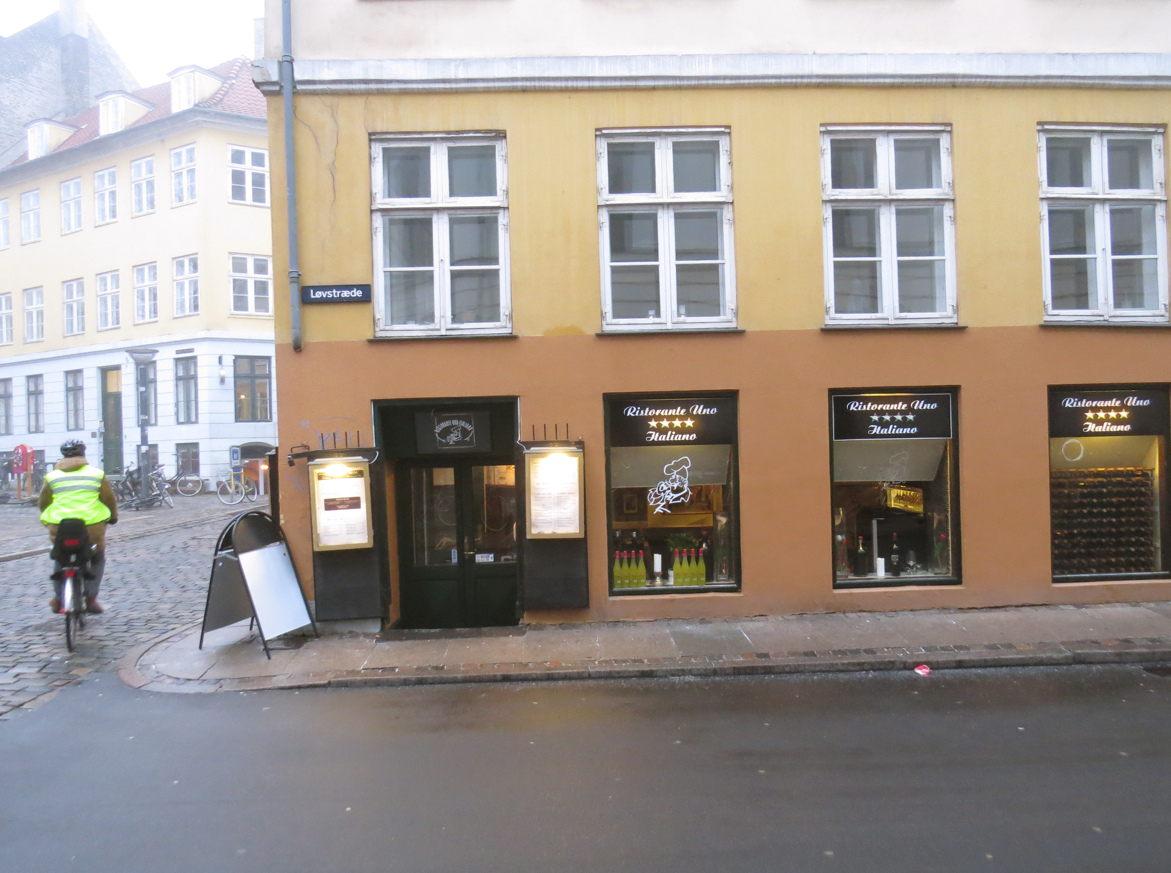 Ristorante Uno, Løvstræde, København